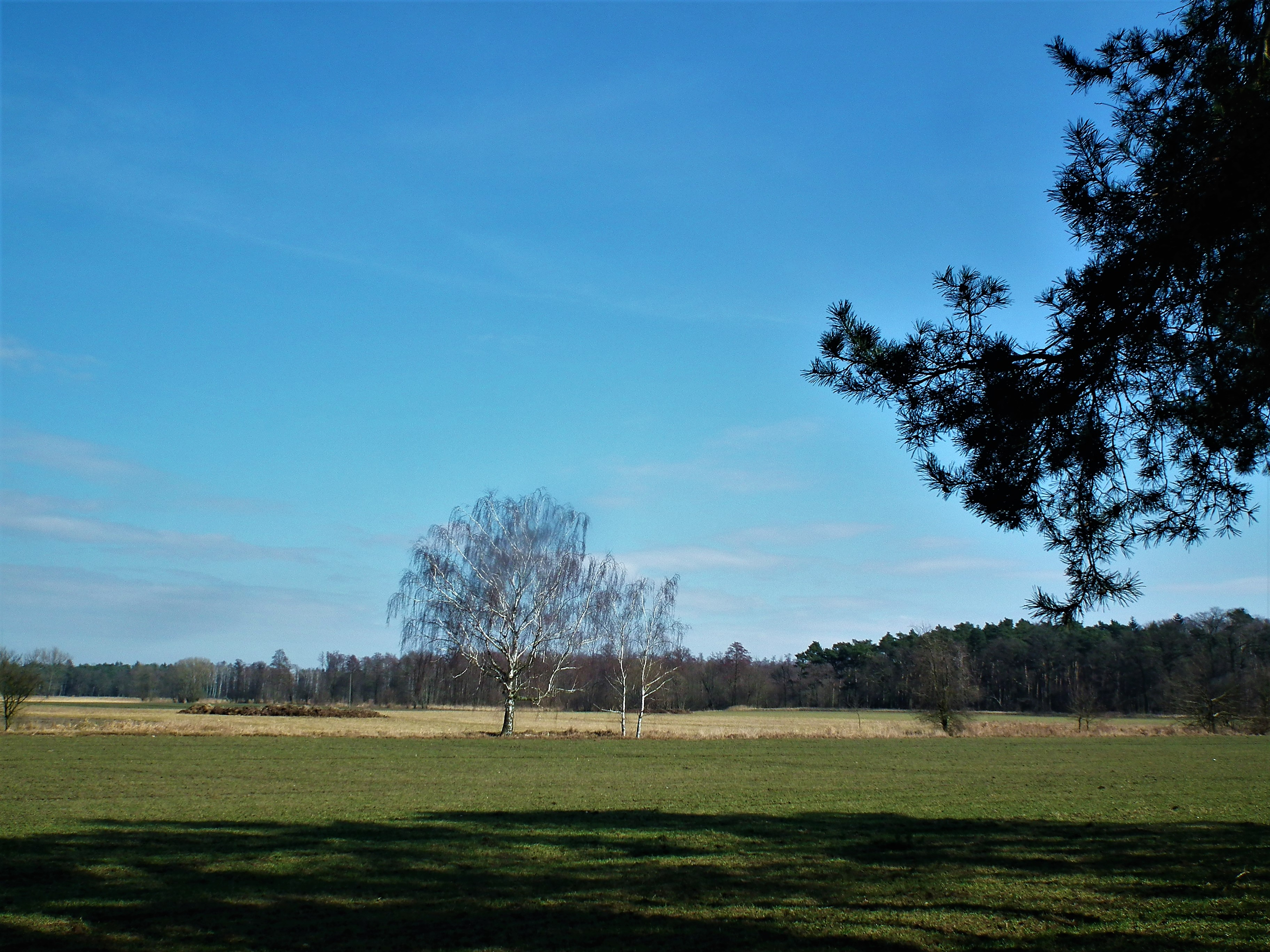 Okolice Reńska w gm. Wielichowo.